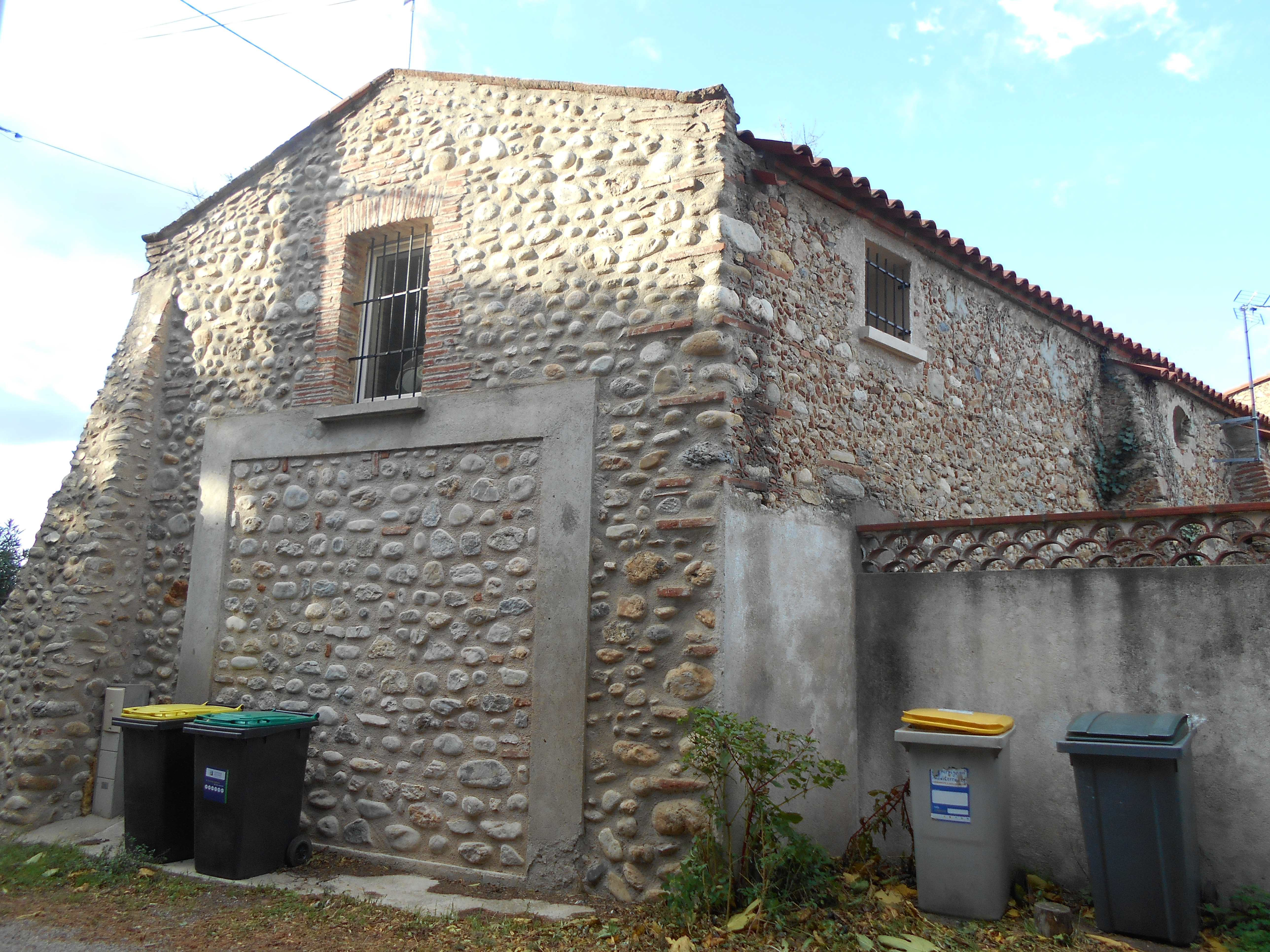 Sant Martí de la Riva